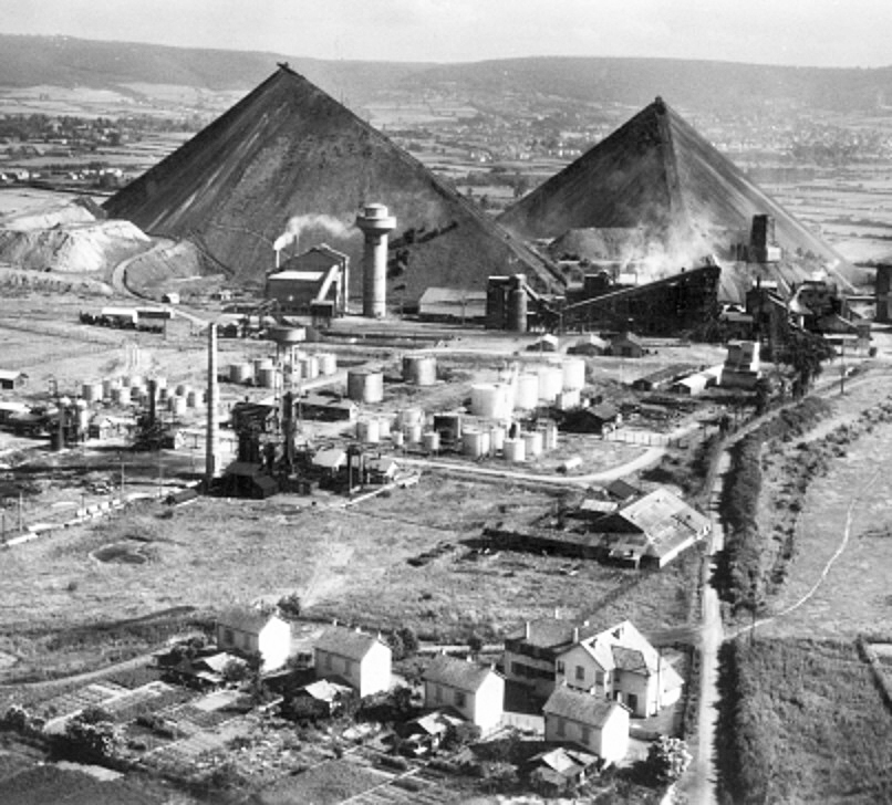 La mine de schiste bitumineux des Télots à Saint-Forgeot à côté d'Autun.